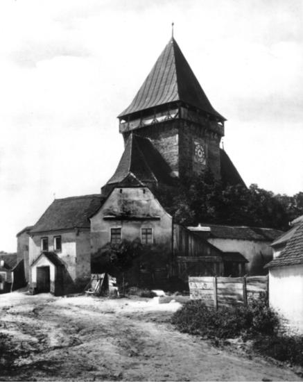 imagine de epocă